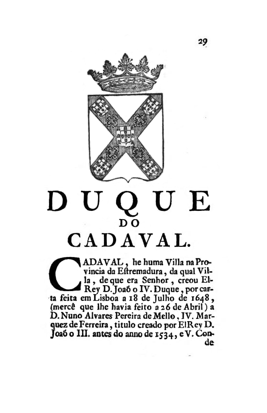 Memorias Historicas e Genealogicas dos Grandes de Portugal - Duque do Cadaval